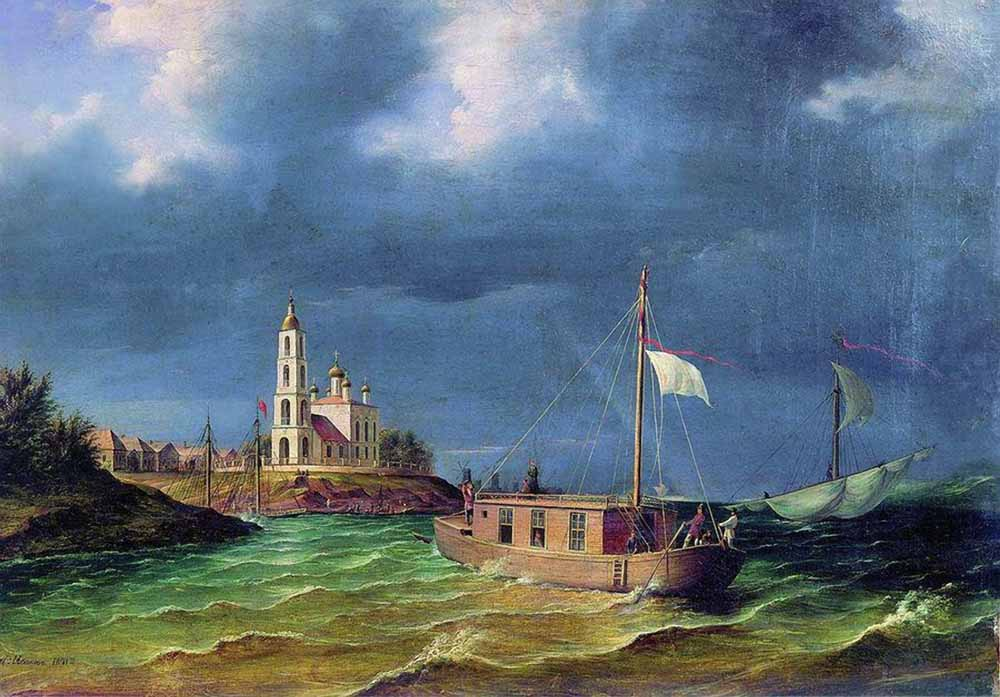 Иванов-Голубой, Антон Иванович. «Барка братьев Чернецовых на Волге в Костромской губернии». 1841. Холст, масло. 48 x 71 см. Государственный Русский музей